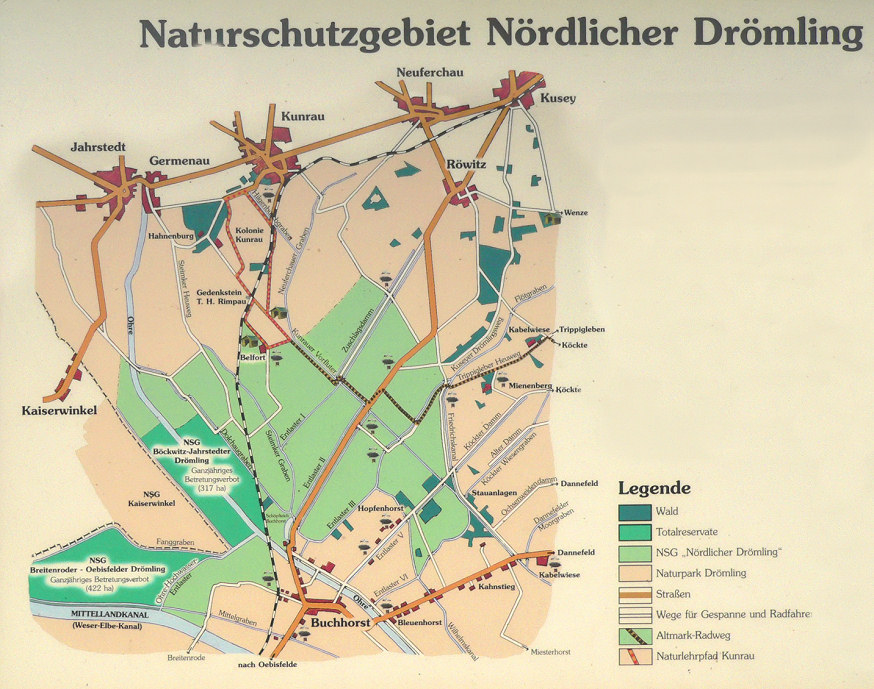 Karte des Drömlings im Teil von Sachsen-Anhalt Foto aufgenommen von Benutzer Benutzer:AxelHH, August 2006